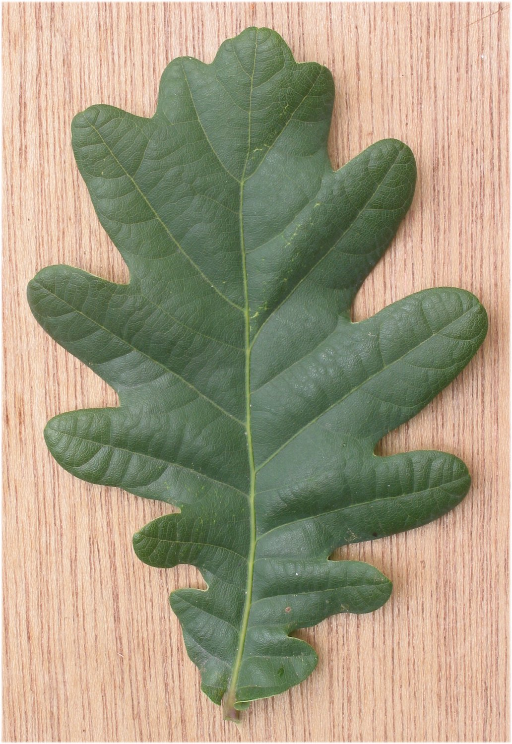 (nl: Zomereik blad) Quercus robur leaf